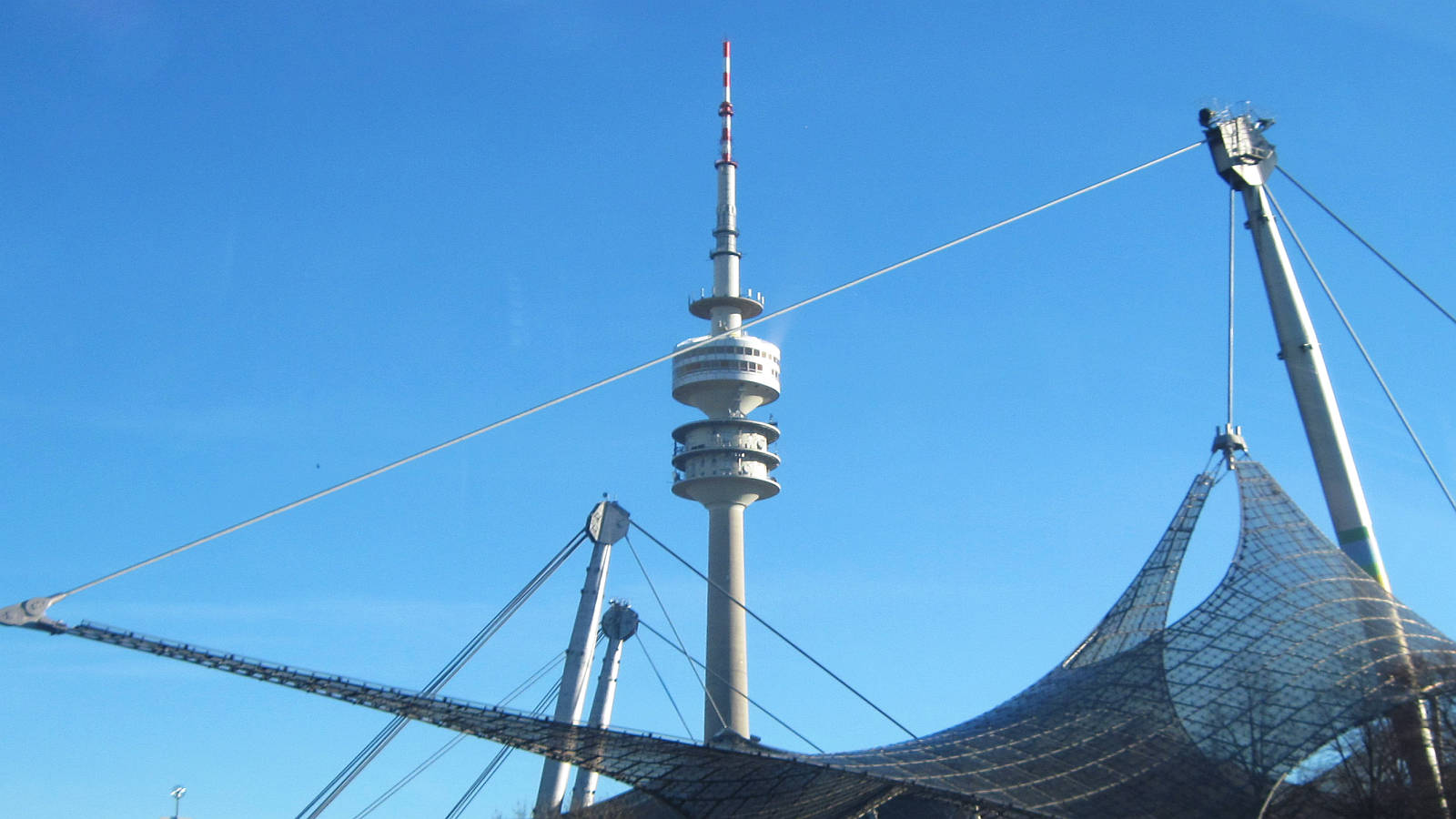 Olympiaturm München mit Restaurant - von de Post 1968 als Fernmeldeturm mit Höhe 291m in 1968 erbaut - auf dem Olympiagelände Turm hinter Detail von den Zeltdachkonstruktionen. Foto Wolfgang Pehlemann IMG_4950